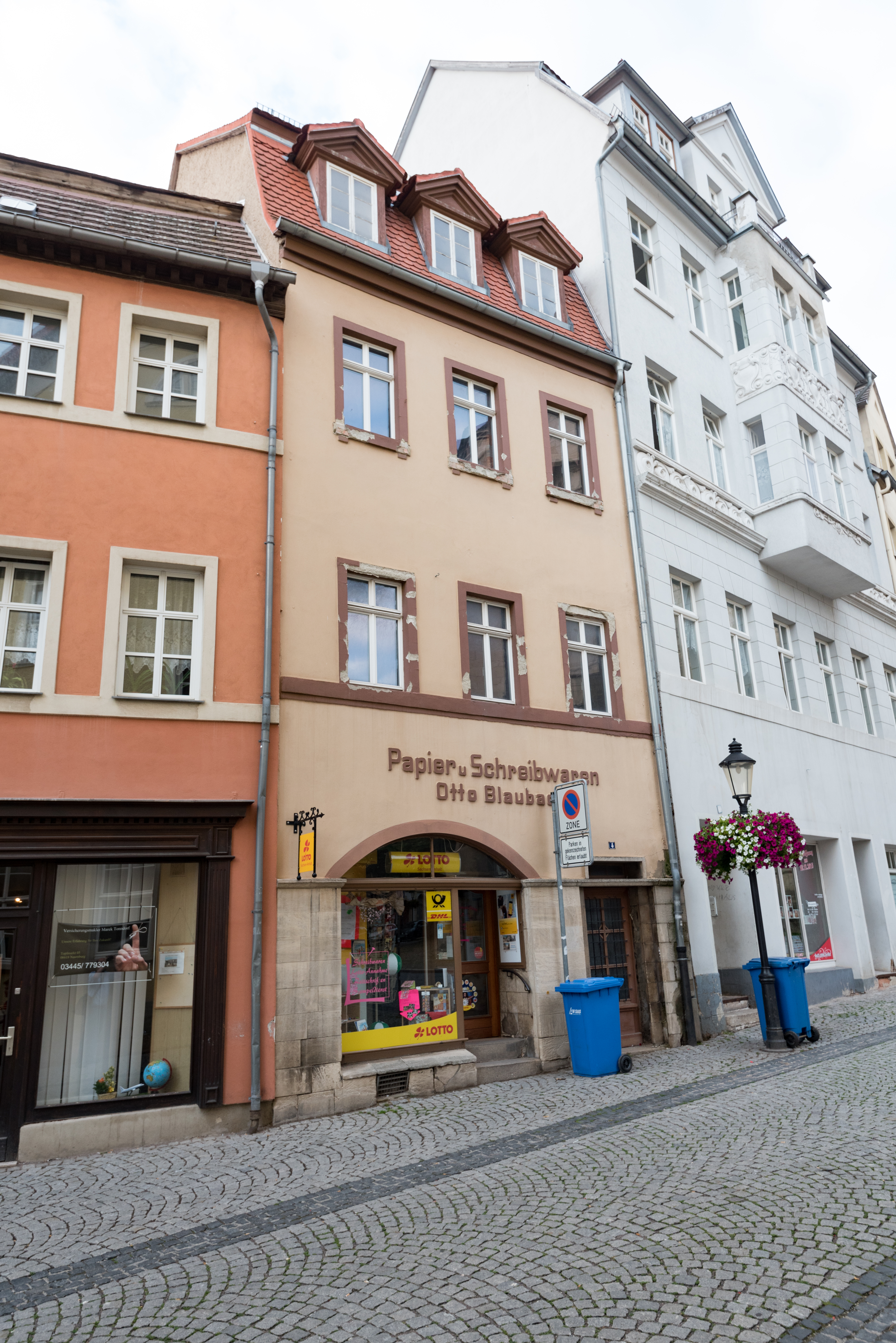 Naumburg (Saale), Topfmarkt 4